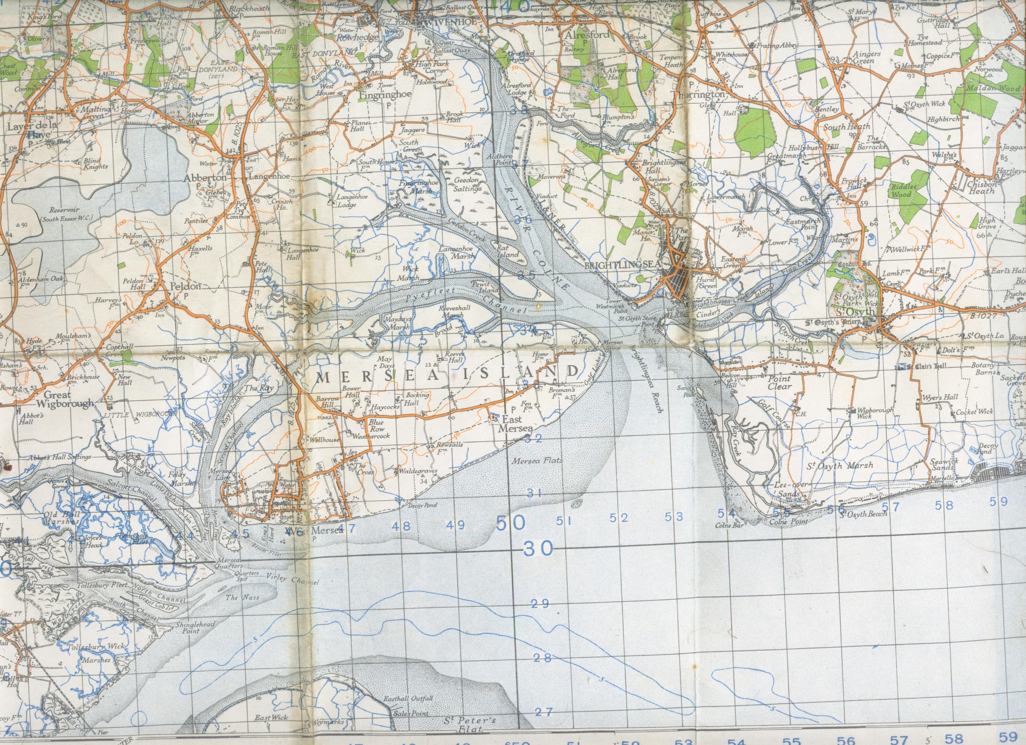 old OS map